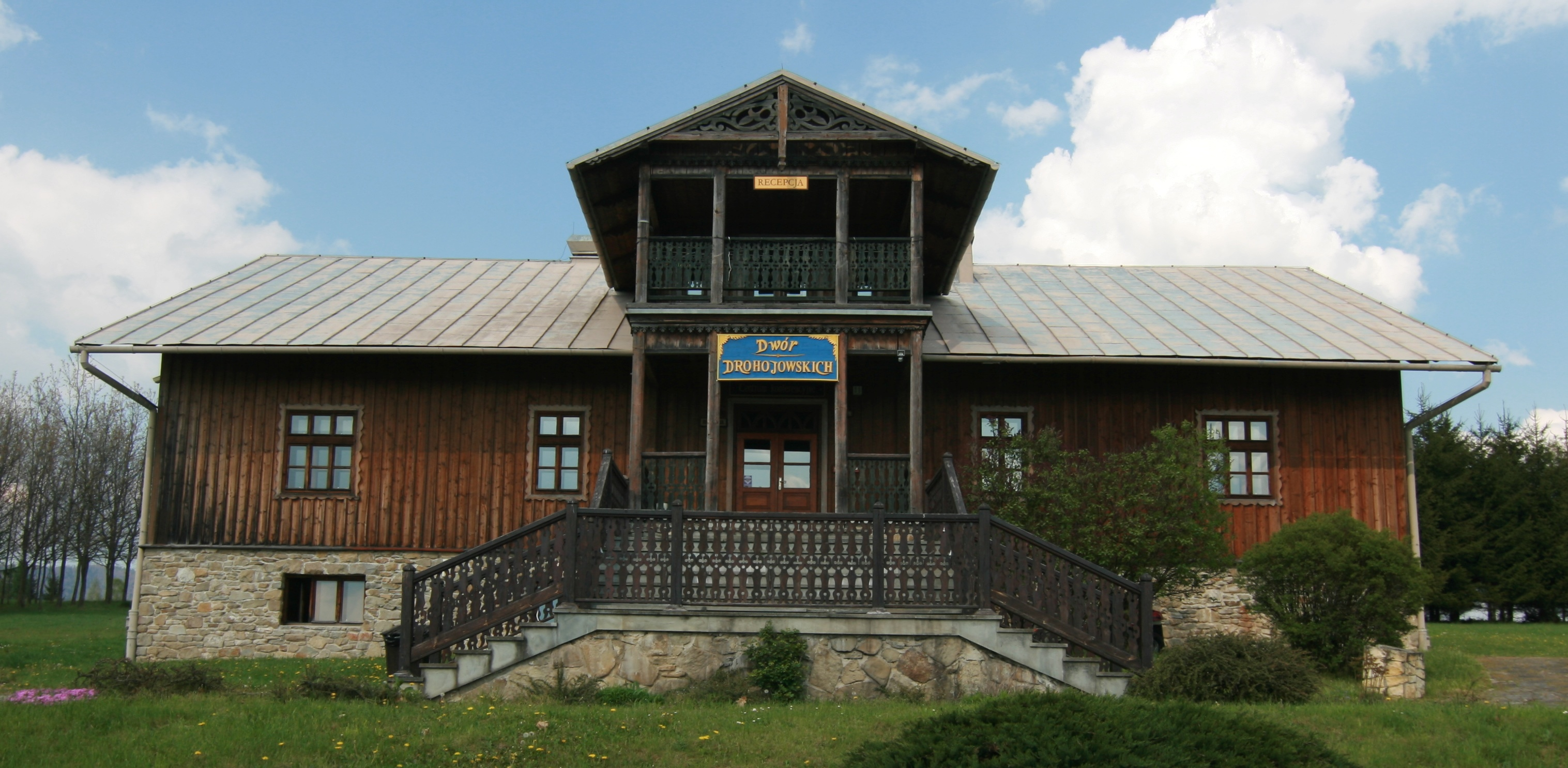 Dwór Drohojowskich w Osadzie Czorsztyn - widok od południa